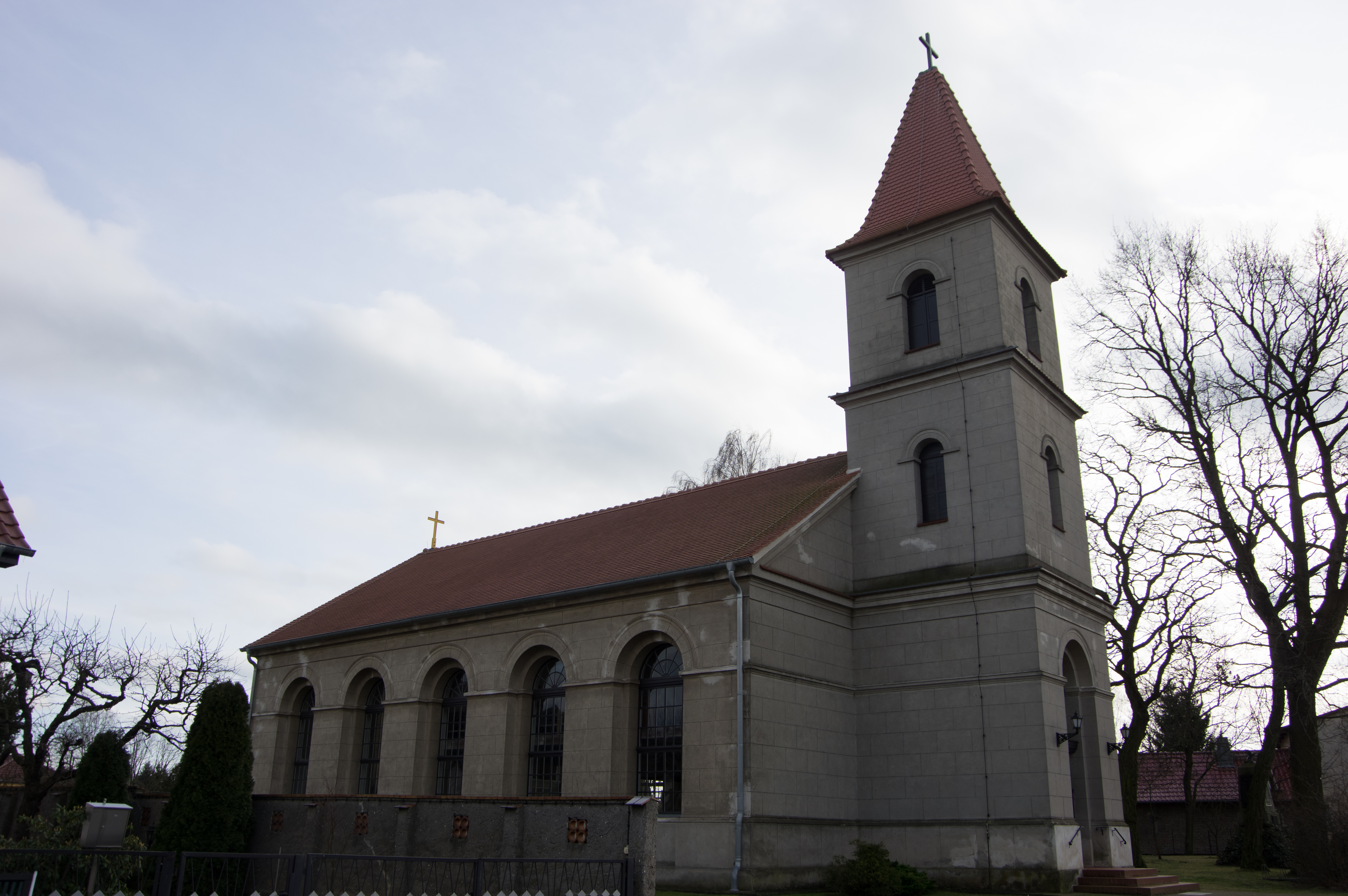 Märkische Heide, Ortsteil Kuschkow in Brandenburg. Die Kirche steht unter Denkmalschutz.